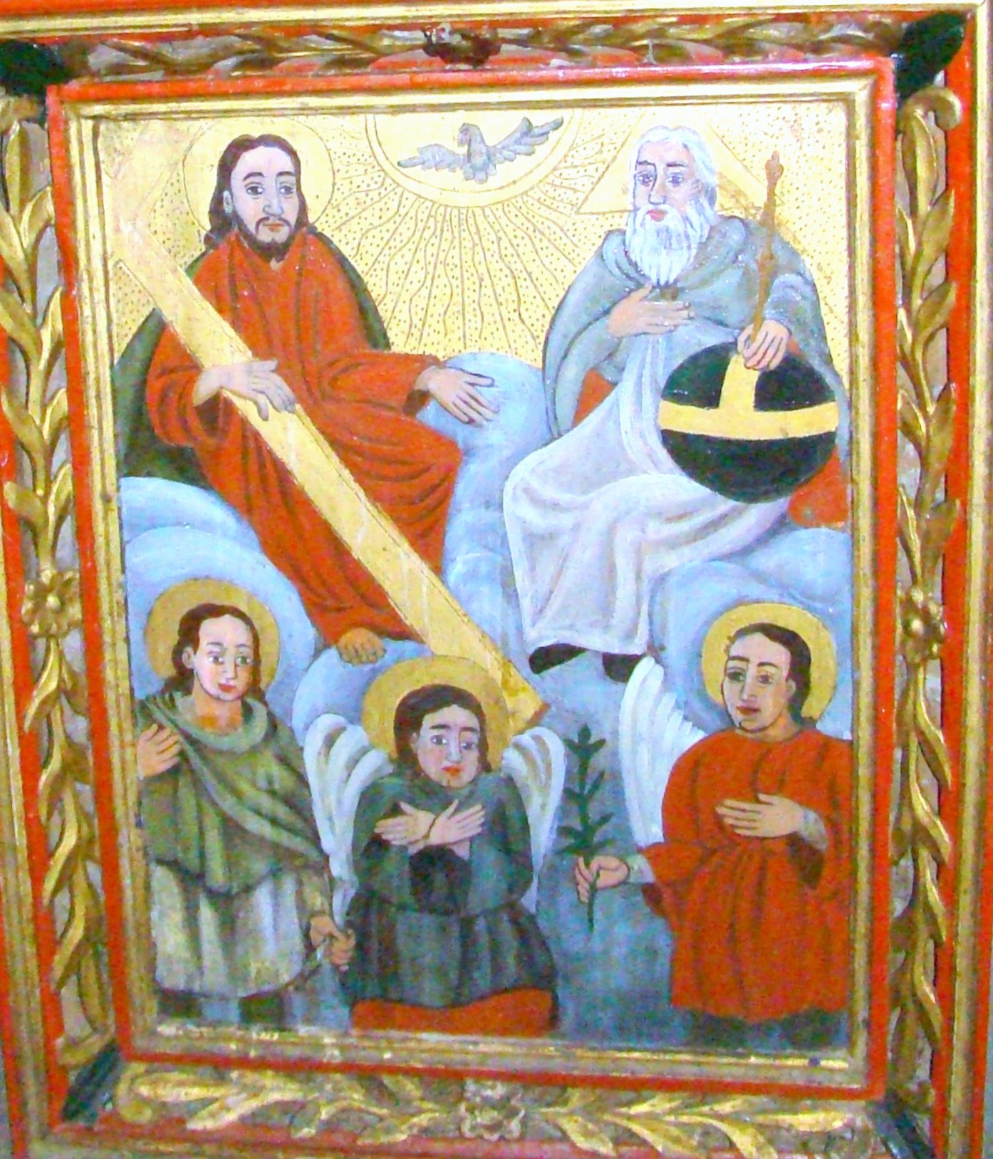 Biserica de lemn "Cuvioasa Paraschiva", sat IZVOARELE; comuna CERNEŞTI